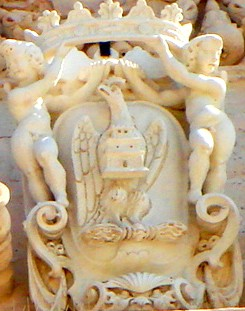 Stemma città di Siracusa Ortigia Palazzo Vermexio